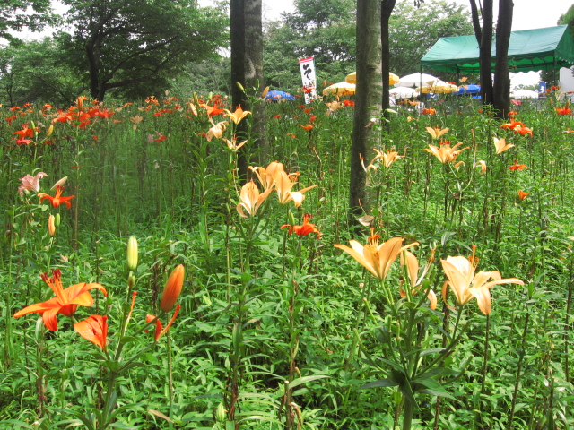 埼玉県所沢市の旧ユネスコ村にある「ゆり園」。通年5月中旬～7月中旬のみに営業。大輪のユリの花が来場者を楽しませてくれている。